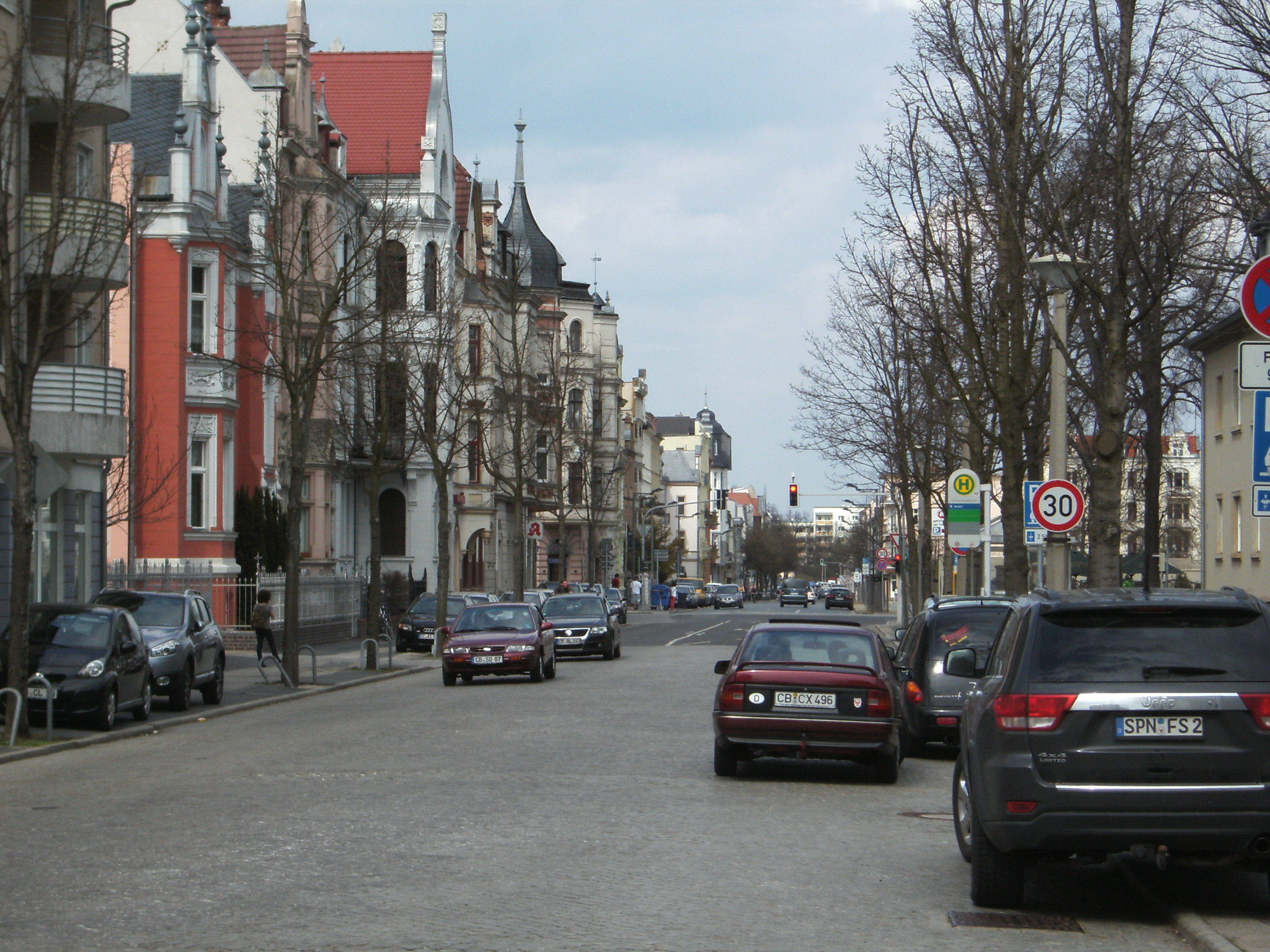 Schillerstraße Blick Richtung Norden